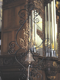 Eigen foto